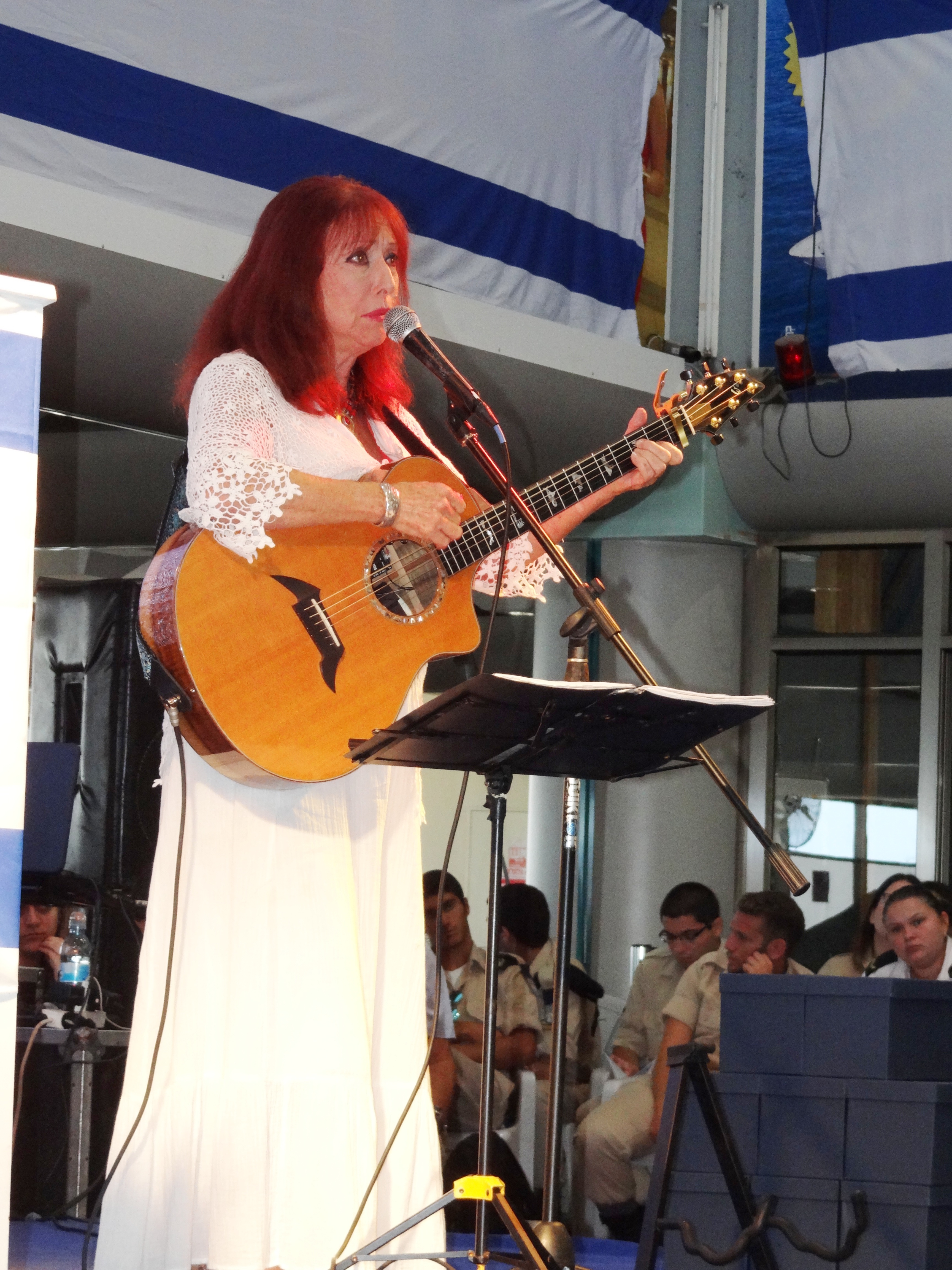 הזמרת הישראלית שולי נתן שהופיעה בטקס הסרת הלוט של אנדרטת אקסודוס, טקס רב משתתפים שהתקיים ב- 18 ביולי 2017 בנמל חיפה, במסוף הנוסעים, בדיוק 70 שנים לאחר גירוש מעפילי אקסודוס. בטקס השתתפו גם חלק ממעפילי אקסודוס שעדיין בחיים ובני משפחותיהם